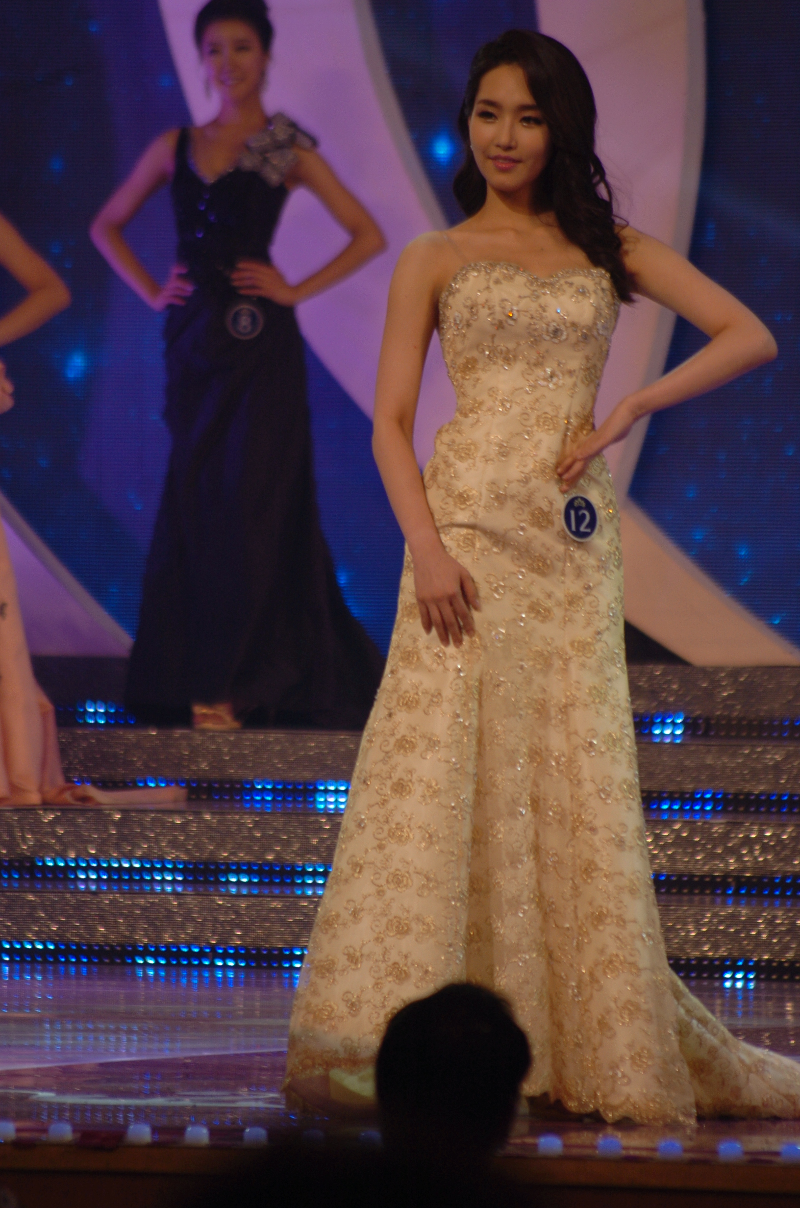 2012 미스코리아 진 김유미(서울 진) 드레스 심사